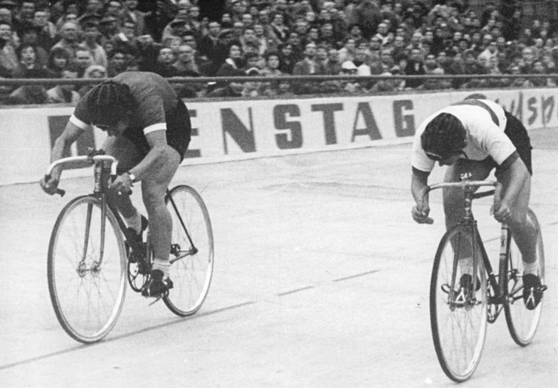 Karla Günther, Karin Stüwe Zentralbild Fanselow 23.7.1961 Try-Krz. Deutsche Sprint-Meisterschaften der Frauen entschieden Spannende Kämpfe sahen die Zuschauer am 22.7.1961 auf der Radrennbahn in Berlin-Weissensee. Ein besonderer Höhepunkt war die deutsche Sprint-Meisterschaft der Frauen. UBz:Karla Günthe (rechts) vom SC Einheit Berlin war im Endspurt die stärkere Fahrerin und wurde vor Karin Stüwe neue deutsche Meisterin.